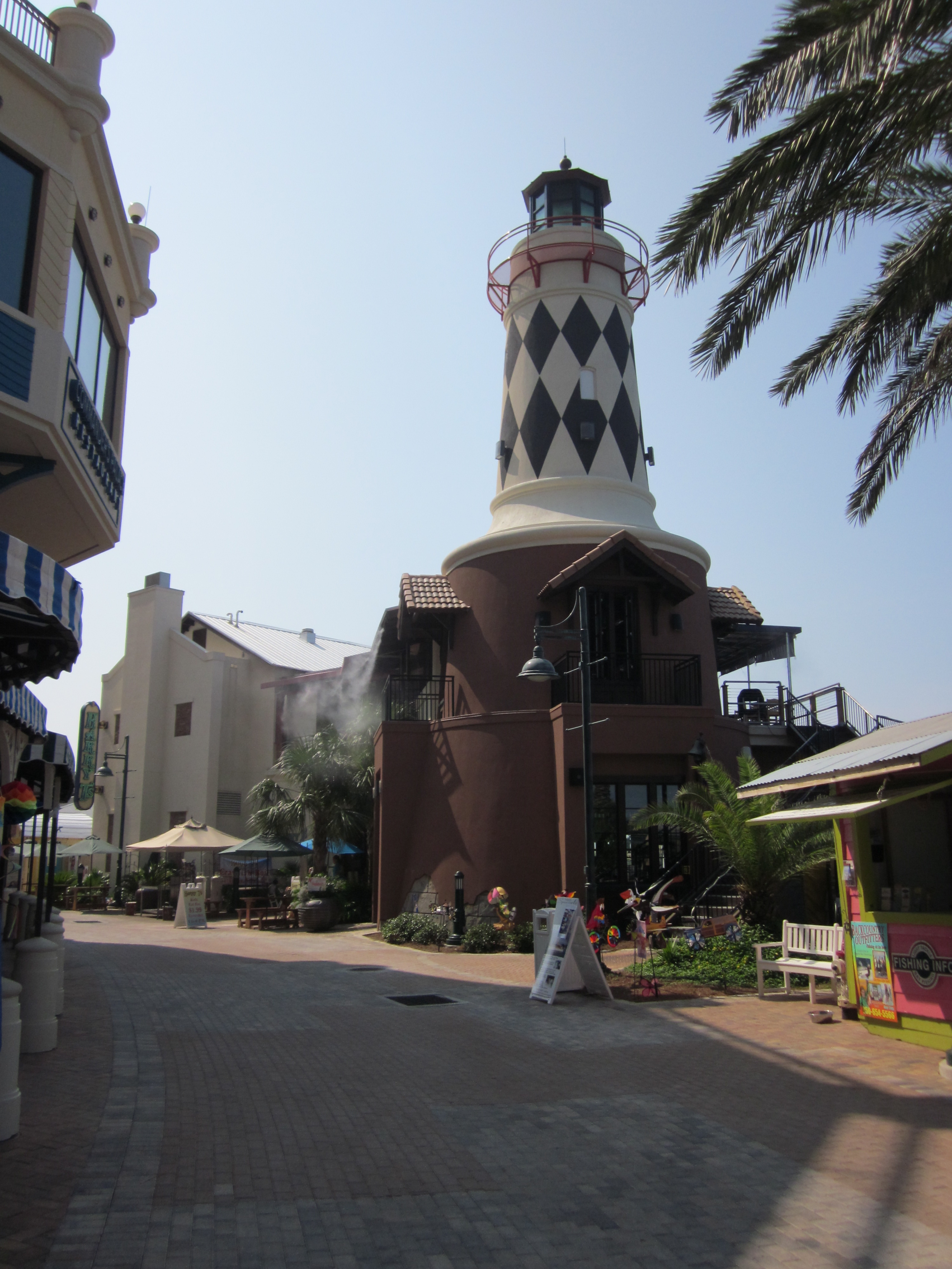 Destin, Florida